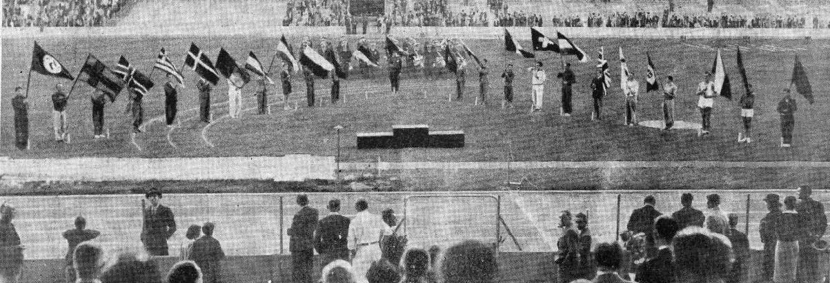 Cérémonie de cloture des championnats d'Europe 1938 à Colombes.